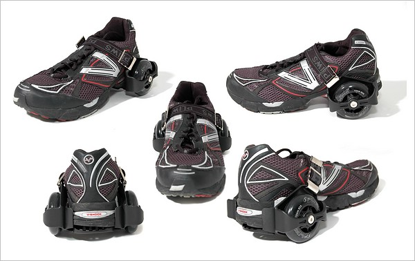 Pliws an Laufschuhen montiert